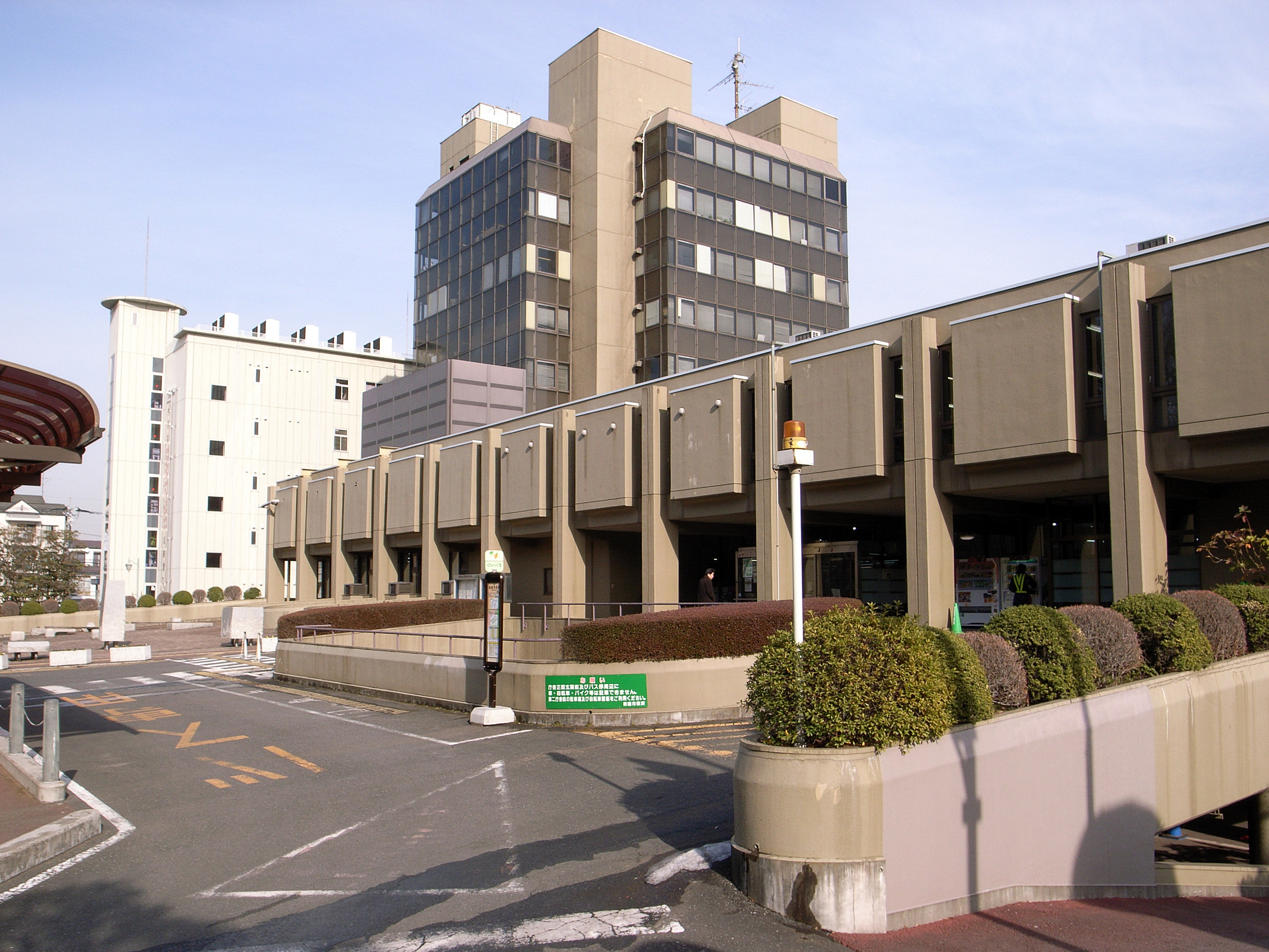 新座市役所 本庁舎と第二庁舎